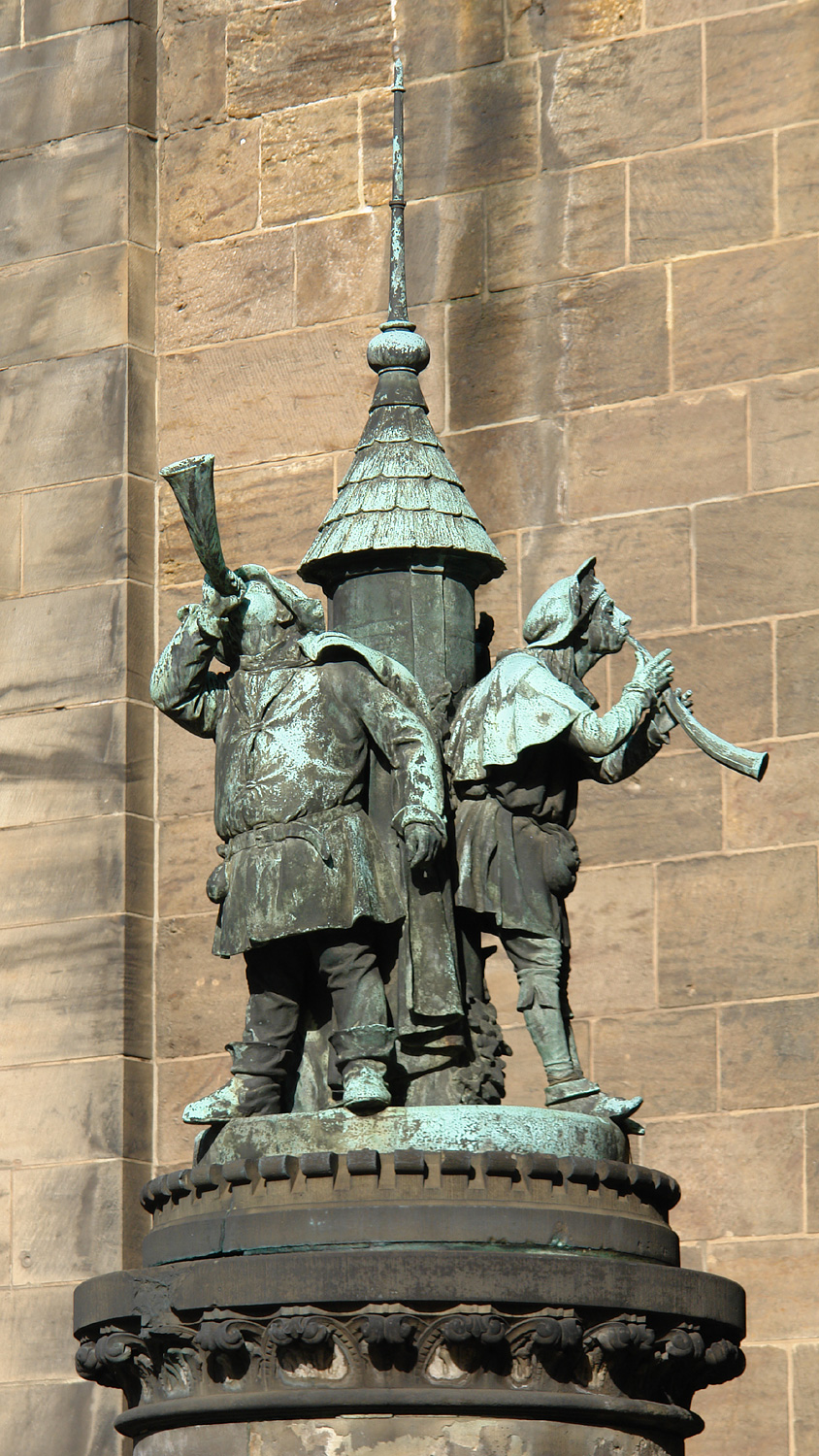 Turmbläser-Brunnen neben dem Bremer Dom. Errichtet: 30. August 1899. Entwurf: Ernst Ehrhardt (1855-1944). Stifter: Franz Ernst Schütte. Material: Stein (Sockel) und Bronze (Figuren). 1942 fiel die Figur einer Metallspende zum Opfer. Der Neuguss wurde am 30. Oktober 1956 enthüllt. Das abgebildete Objekt ist ein geschütztes Kulturdenkmal in der Freien Hansestadt Bremen, mit der Nr. 0056 beim Landesamt für Denkmalpflege registriert.